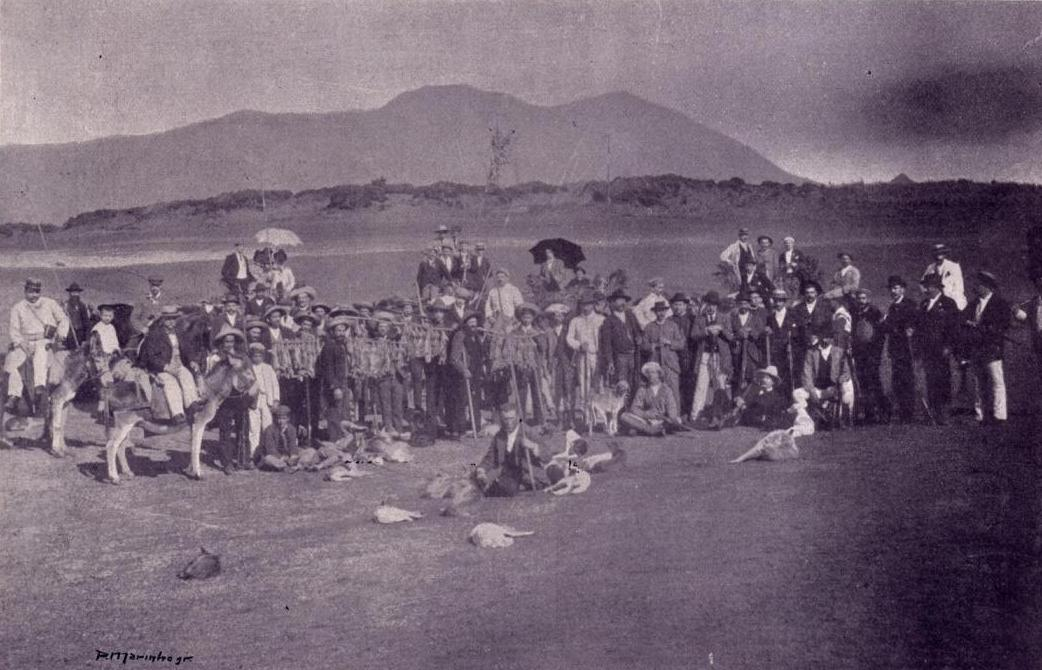 "Santa Maria - Uma caçada [aos coelhos] no Barreiro da Faneca", freguesia de São Pedro, concelho de Vila do Porto, ilha de Santa Maria, in Álbum Açoriano, fascículo nº 36, 1903, p. 281.